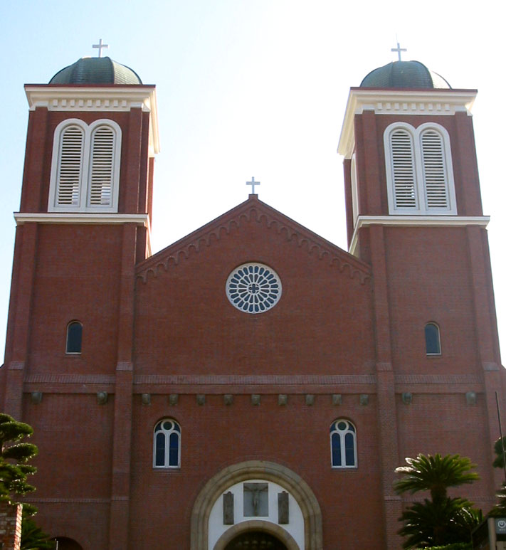 Urakami Cathedral, Nagasaki, Nagasaki, Japan